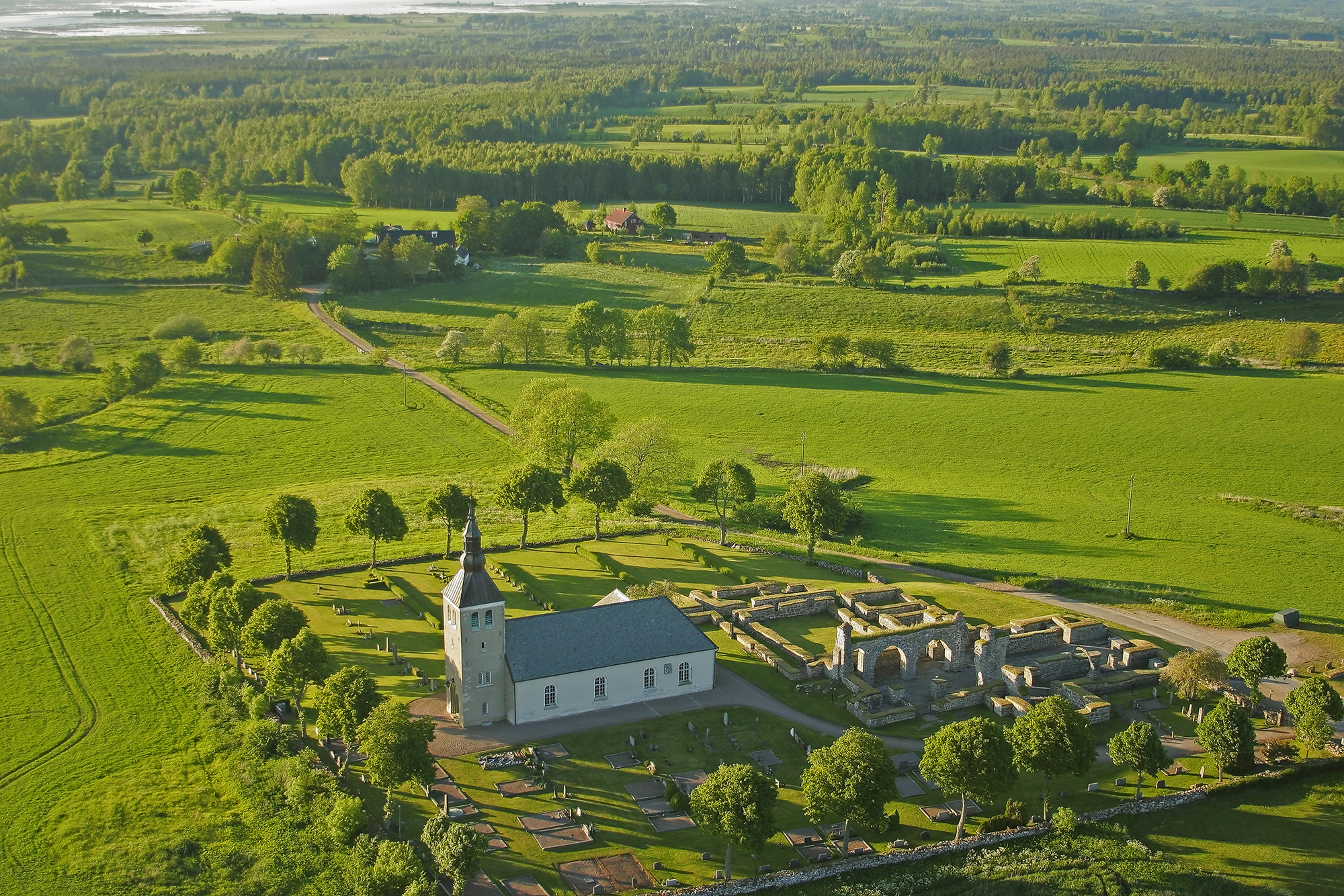 Gudhem Kyrka och Kloster ruin, kyrkobyggnad i Gudhems församling, Skara stift, Falköping, Västra Götaland, Sverige Can Burcin Sahin / LCProBild /